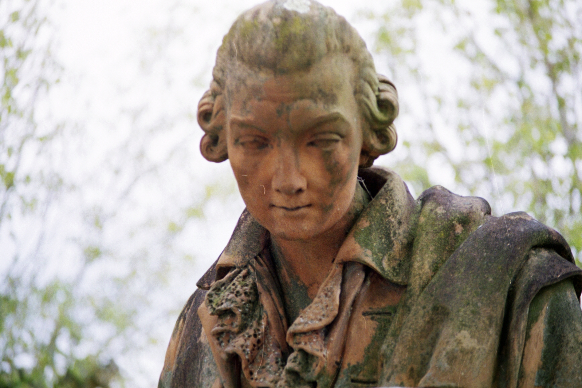 Buste en terre cuite de Claude Bourgelat,fondateur des écoles vétérinaires, par Bernard Griffoul-Dorval, sculpteur toulousain. Il s'agit d'un élément d'une statue initialement placée sur la porte d'honneur de l'ancienne école vétérinaire. Son pendant était une autre statue similaire représentant l'agronome Olivier de Serres et placée de même. Seul le buste de Bourgelat a été conservé, celui d'Olivier de Serres a été perdu, sans doute dérobé sur son lieu de dépôt en 1963.